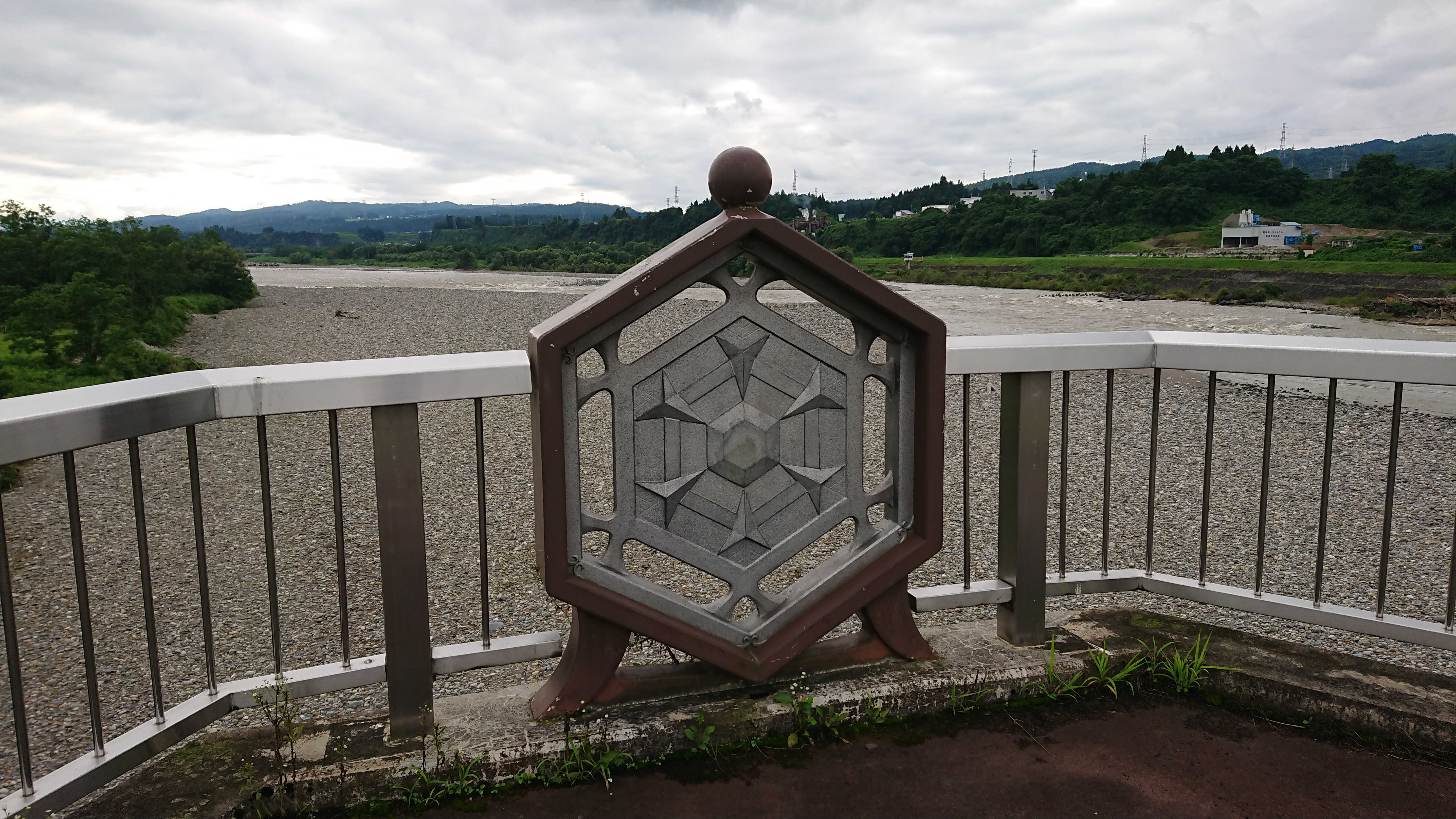 妻有大橋を撮影。 新潟県十日町市、2020年7月30日。